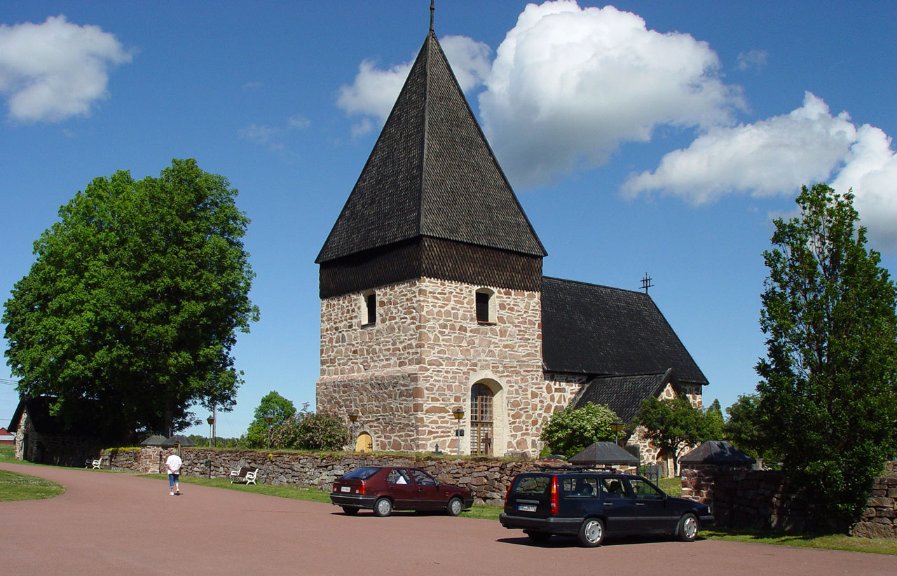 Åland-Eckerö. St. Lars Kirche (1280)